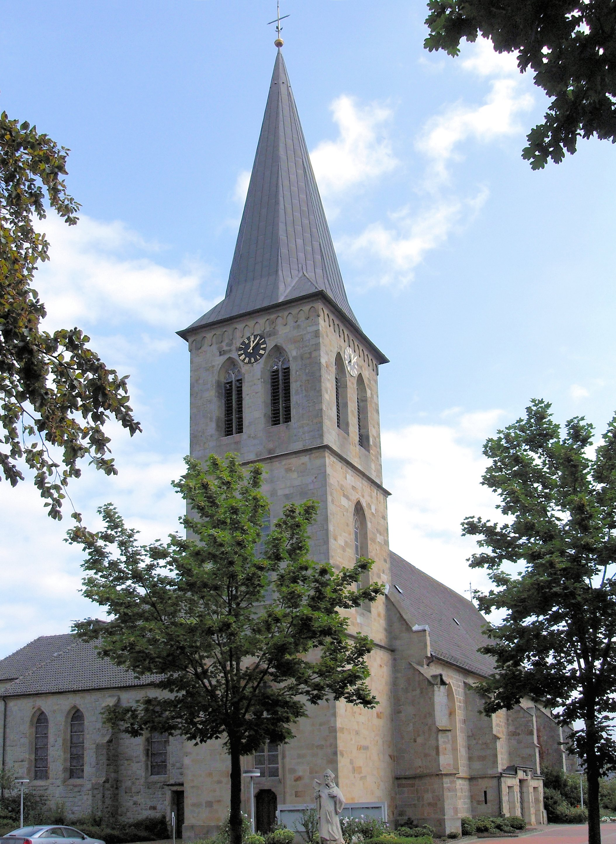 Pfarrkirche St. Servatius in Beesten, Landkreis Emsland